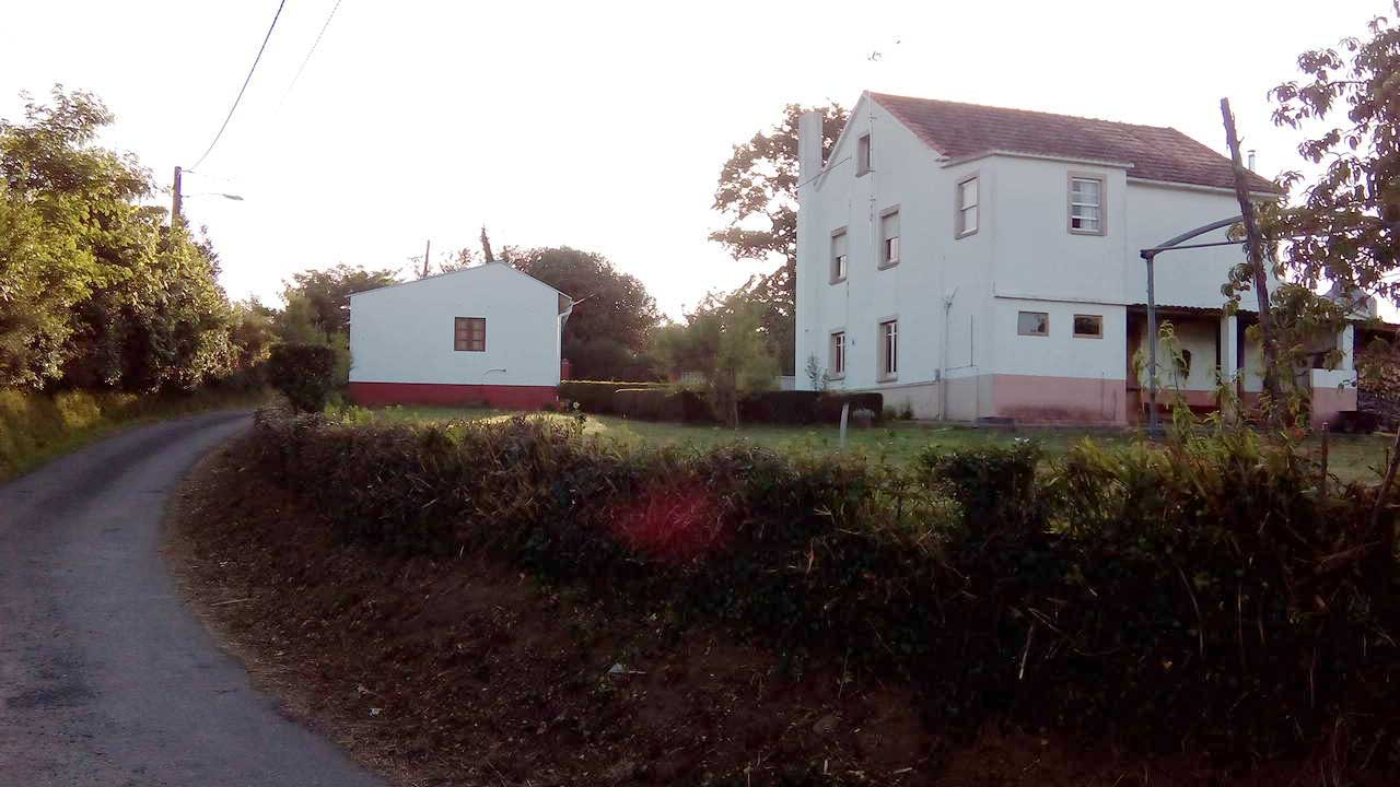 Vista do Abelleiro, O Val.